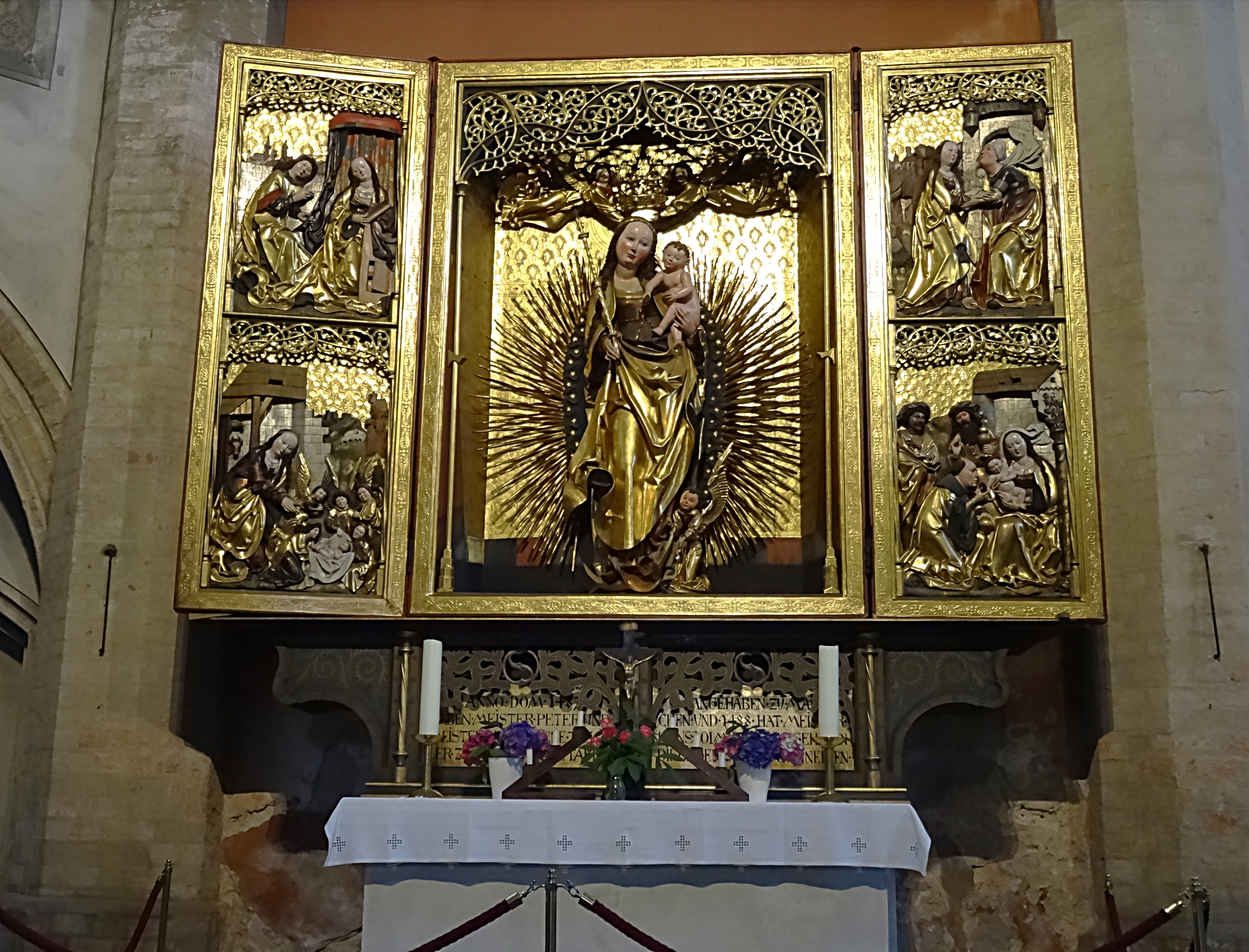 Der spätgotische Altar der Goldenen Madonna (Marienaltar) von Jakob Beinhart (um 1510) in der Barbarakapelle [1] in der Dreifaltigkeitskirche (Görlitz)